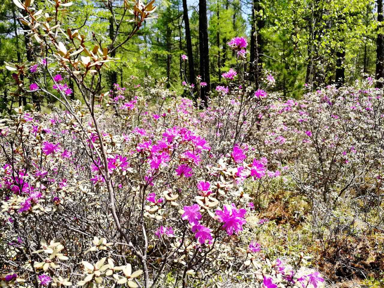 Blooming of Rhododendron in the South of Buryatia, Russia